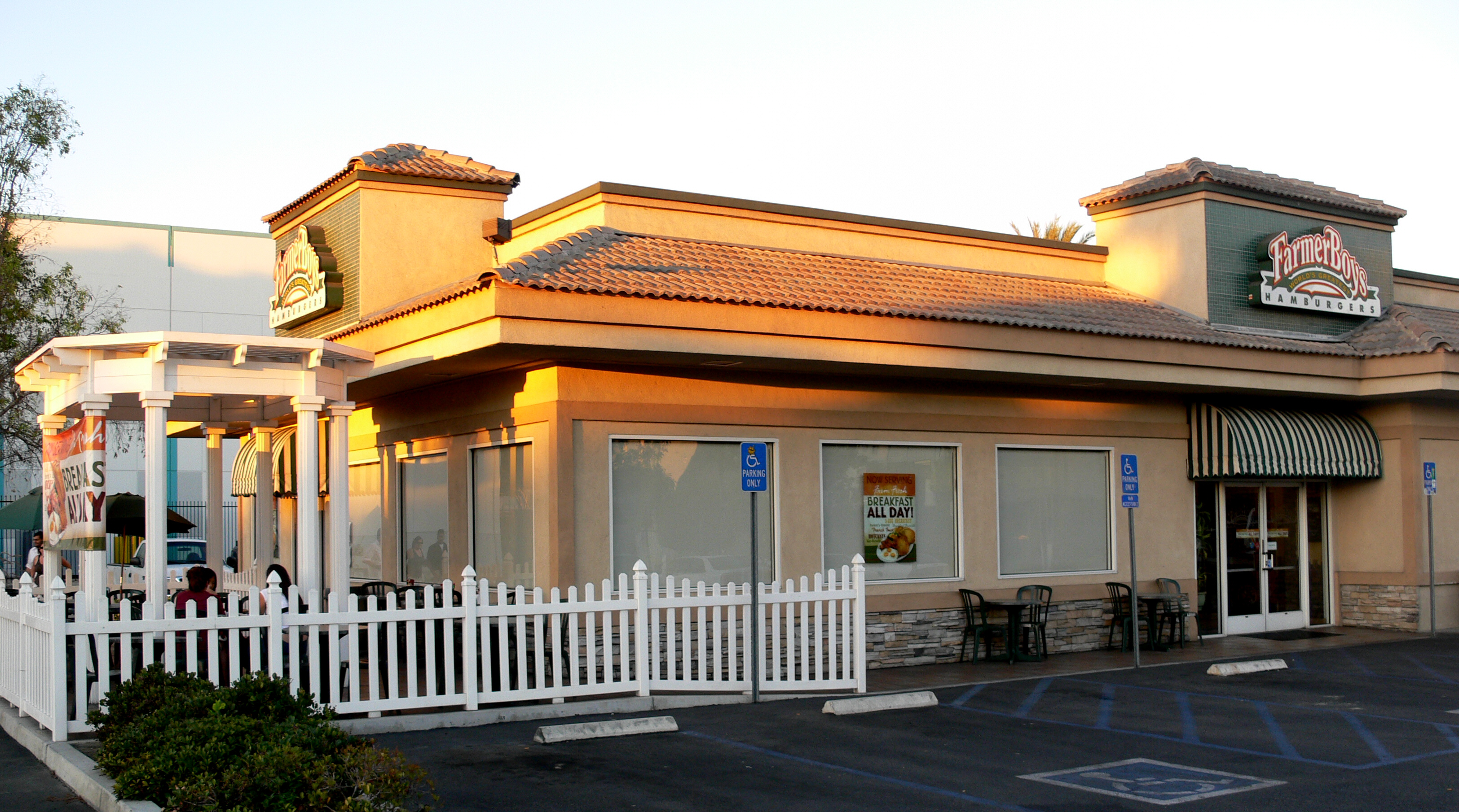 Farmer Boys restaurant, 726 S. Alameda, Los Angeles, California